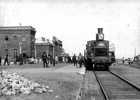 Паровоз на первом вокзале Ставрополя